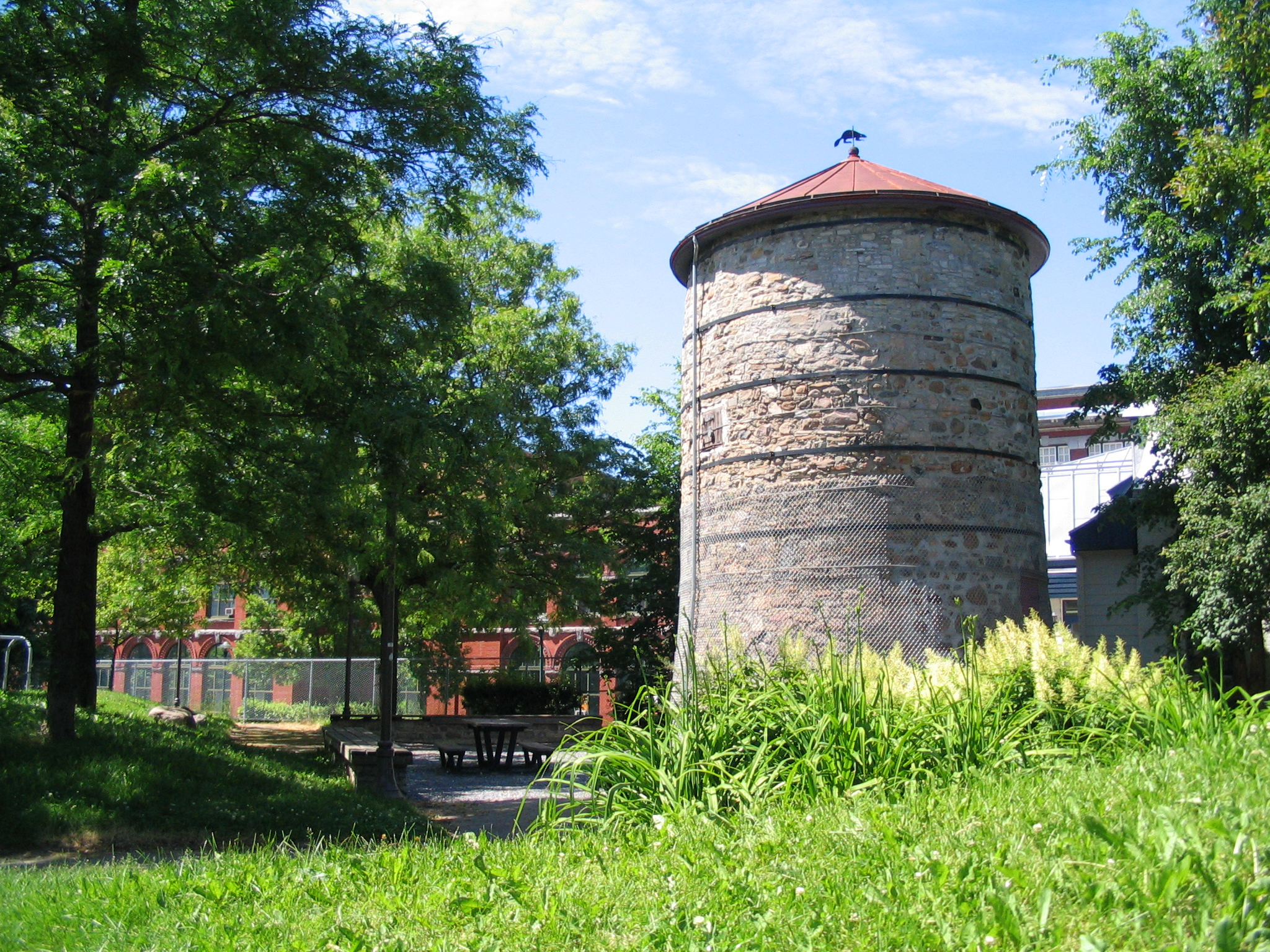 Le moulin à vent de l'Hôpital-Général-de-Québec dans la basse-ville.